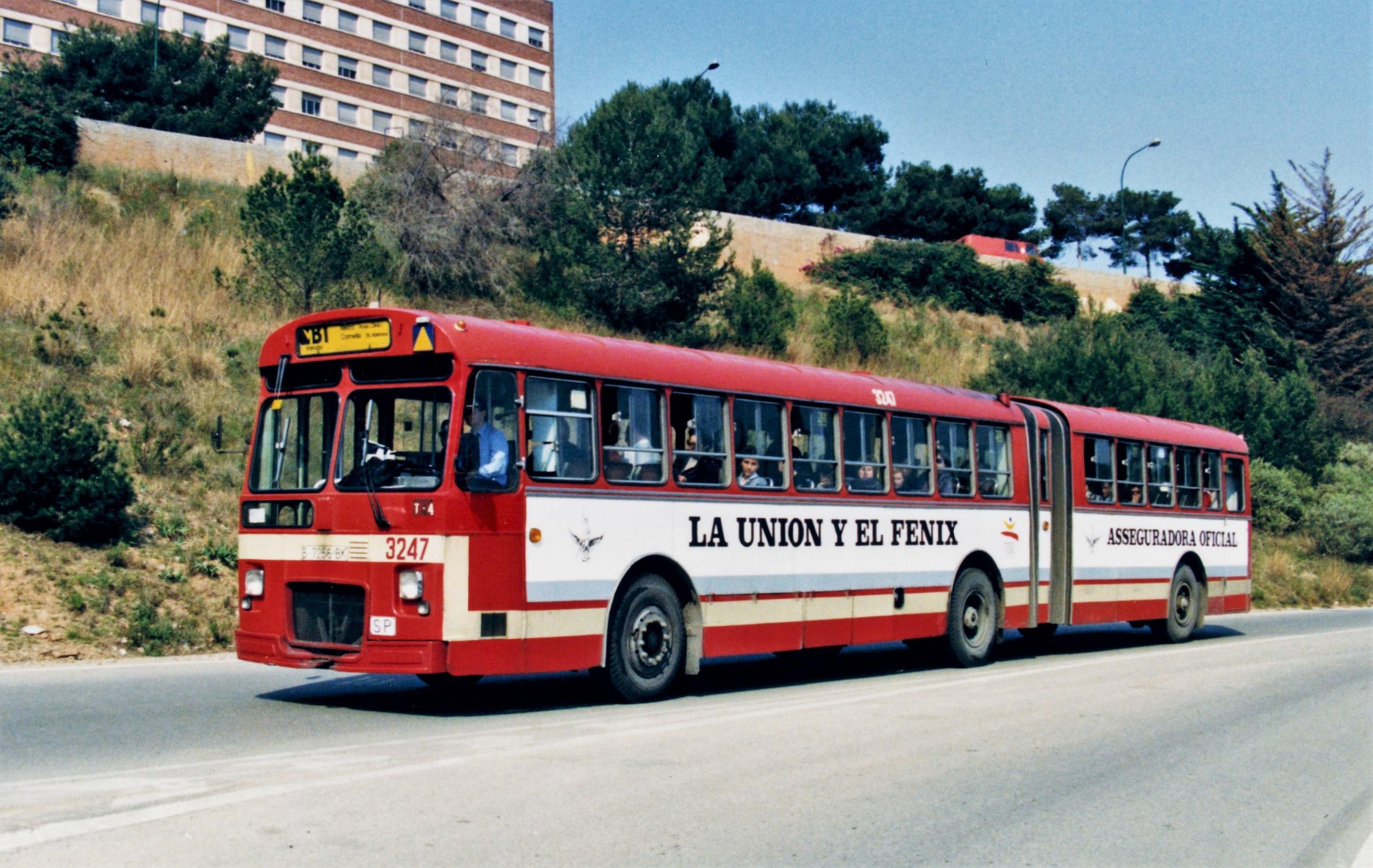 El autobús articulado 3247 de Transports de Barcelona en Esplugues de Llobregat, frente al hospital de Sant Joan de Déu, prestando servicio en la línea suburbana BI de Barcelona Plaça Universitat a Cornellà de Llobregat, por Sant Ildefons.